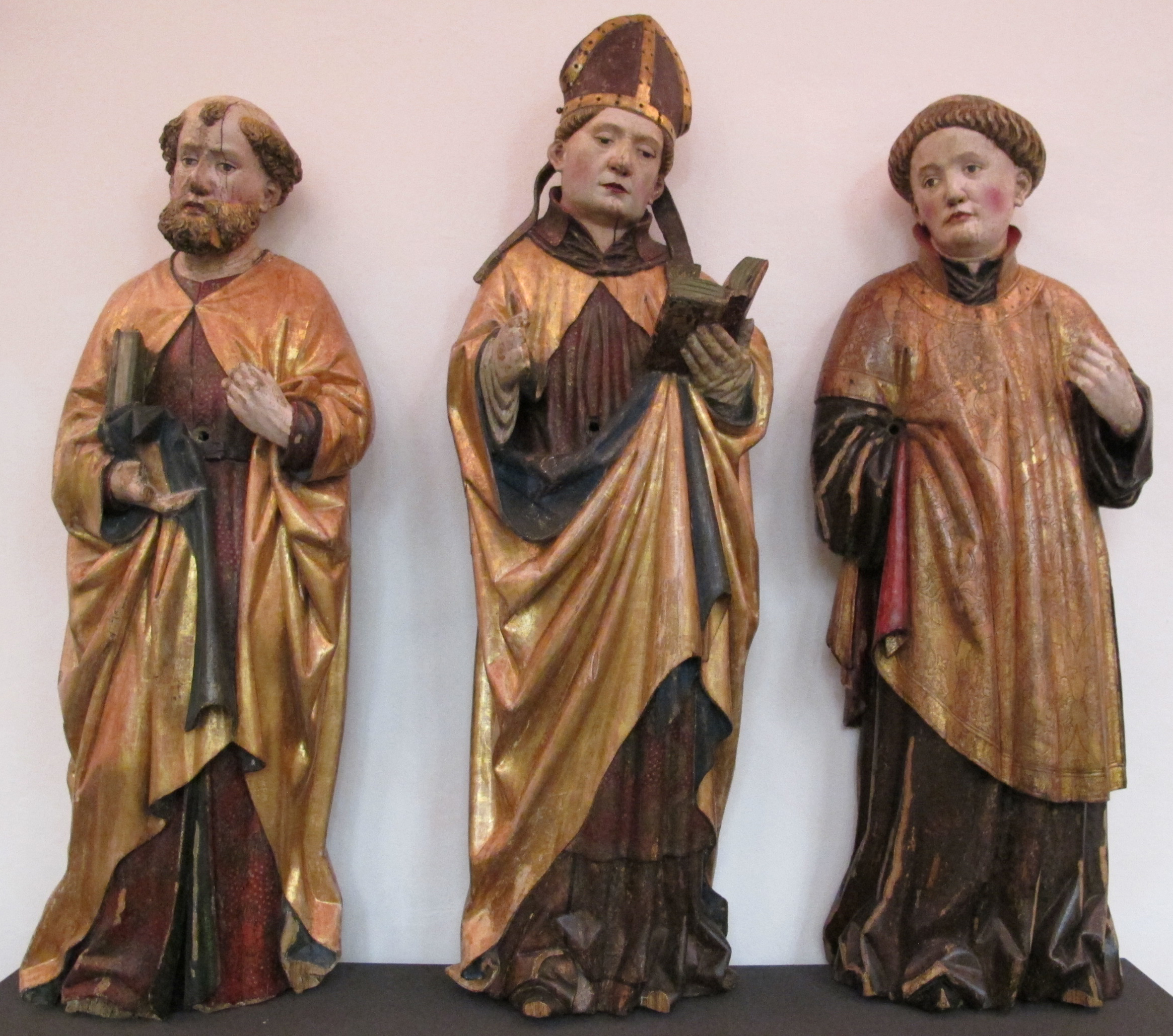 Simon lainberger (attr.), san pietro, un vescovo e un diacono, 1465, da st. michaeliskirche zu hof, norimberga